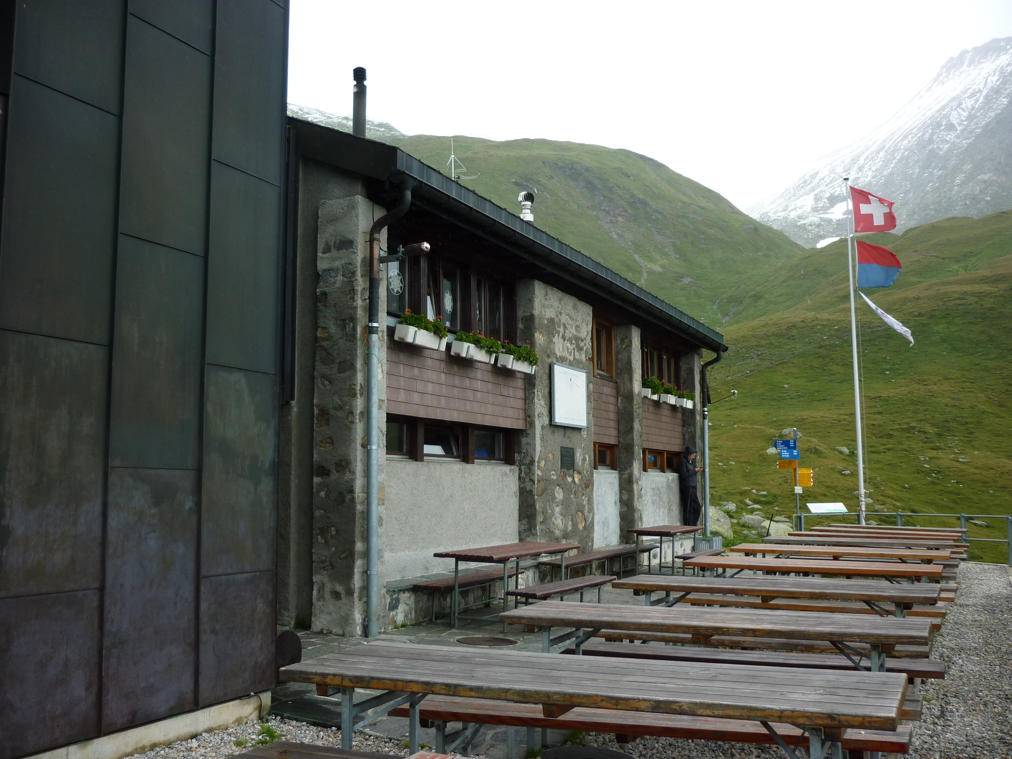 Motterasciohütte, Altbau von 1967, Tessin, Schweiz